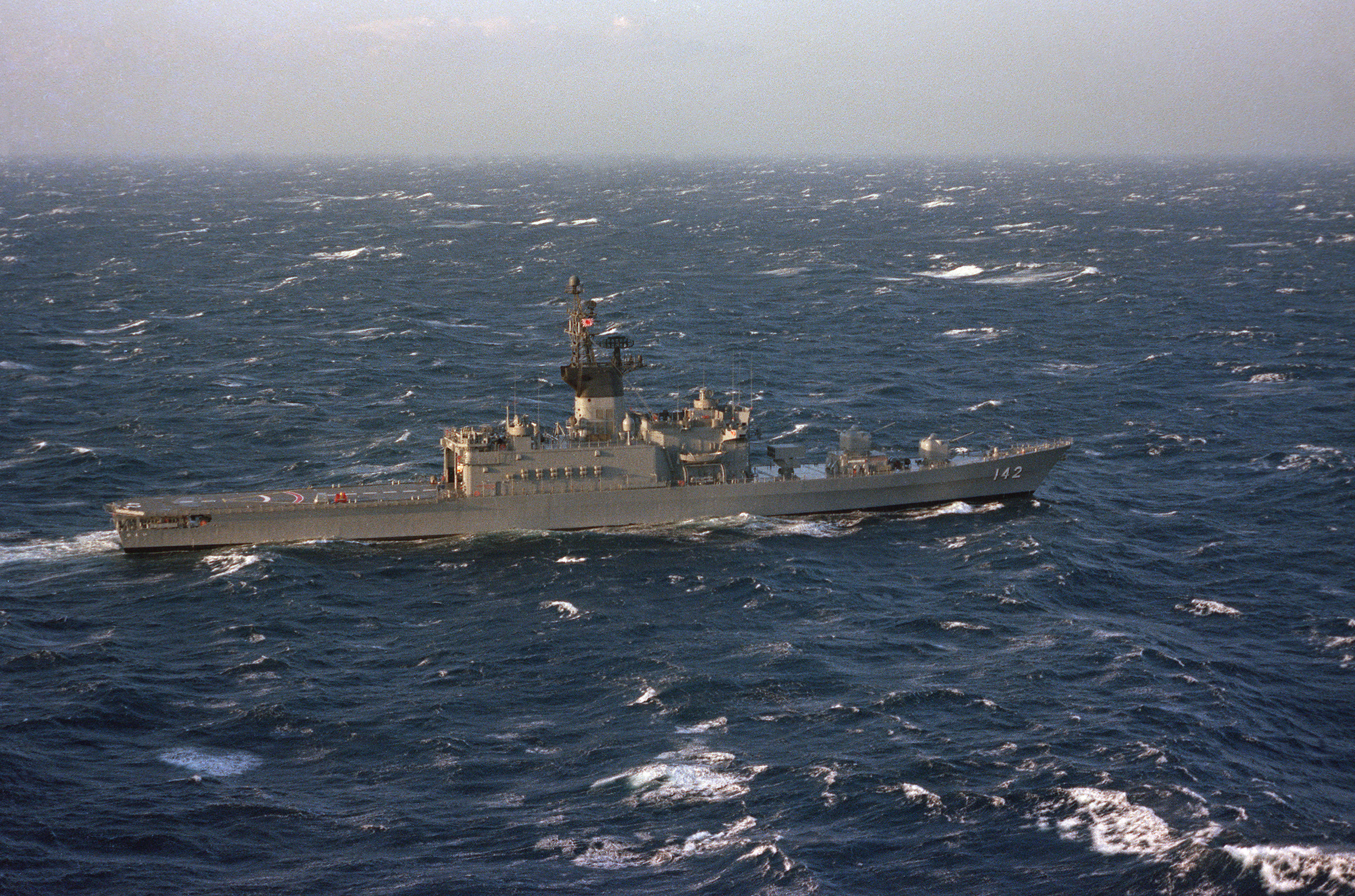 航行中の護衛艦ひえい。場所不明。